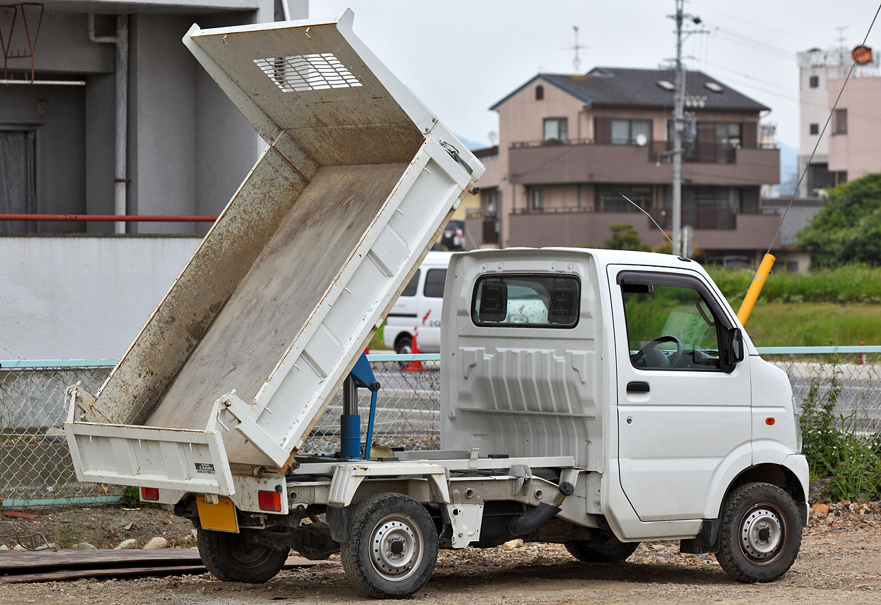 Suzuki Carry Dump truck.